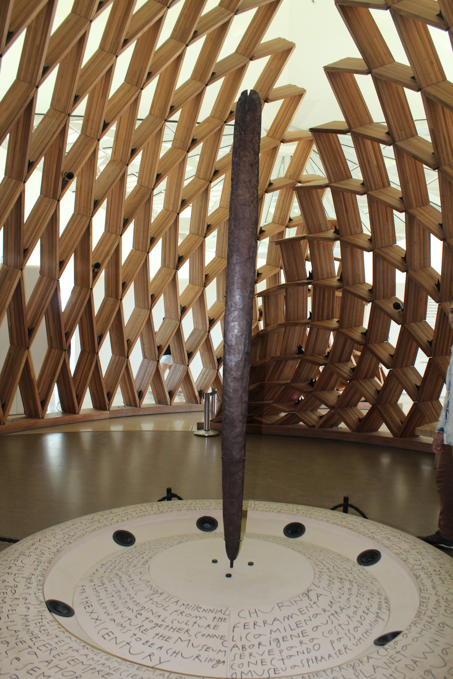 A peça de madeira no centro é chamada churinga, colocada sobre uma base com as seguintes inscrições: "Churinga é uma ferramenta simbólica milenar da cultura aborígene australiana que serve para costurar o tempo, conectando passado e futuro. O museu aspira a ser uma churinga para o século XXI." "Está amanhecendo em algum lugar do planeta agora. Cada amanhecer é sempre igual e sempre diferente." No fundo, uma oca de madeira que cerca a churinga. Fotografia da Exposição Nós - Museu do Amanhã, na Praça Mauá, Rio de Janeiro, RJ, Brasil.